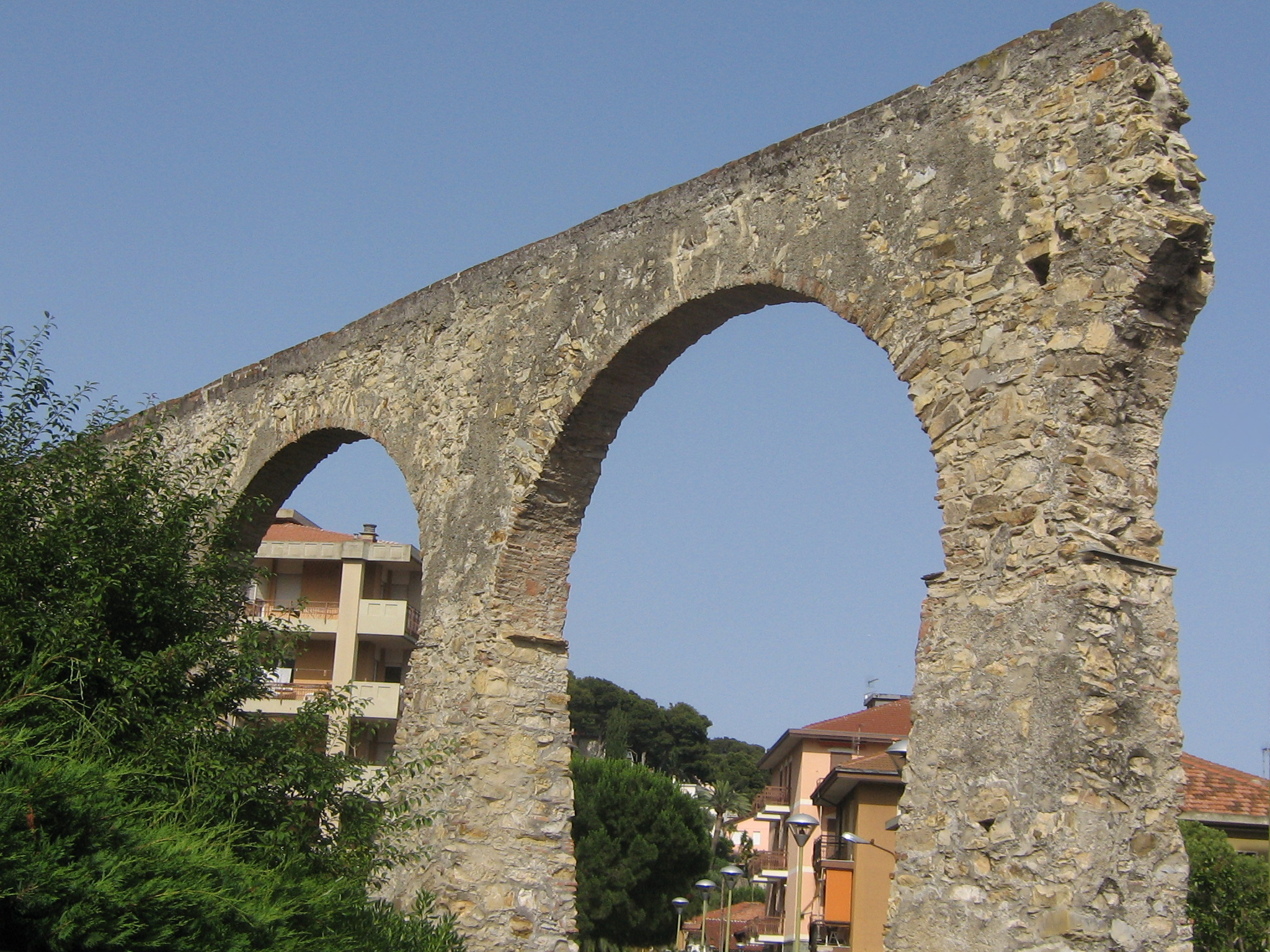 Acquedotto di Andora